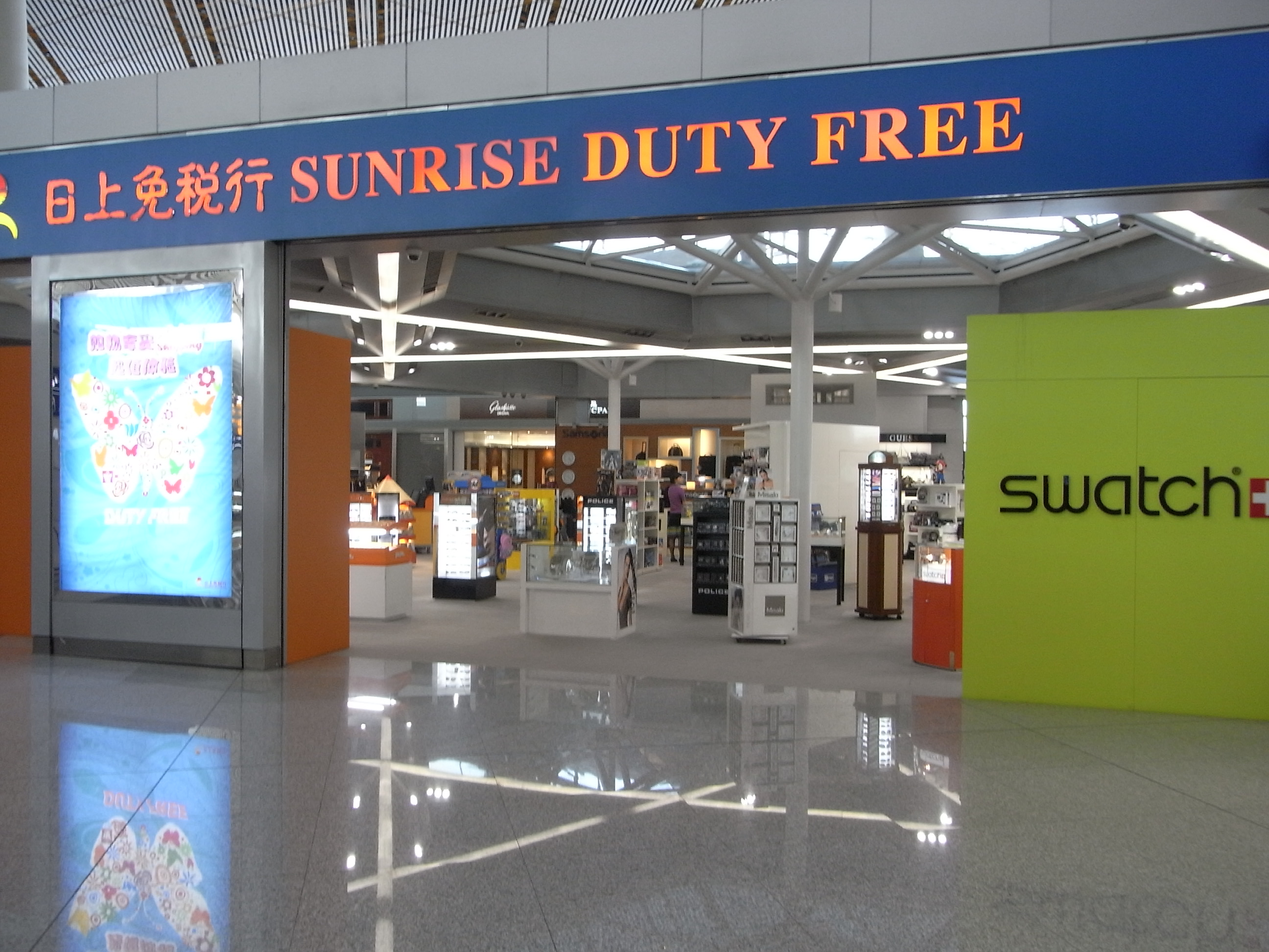 zh:2010年zh:8月北京 北京首都國際機場